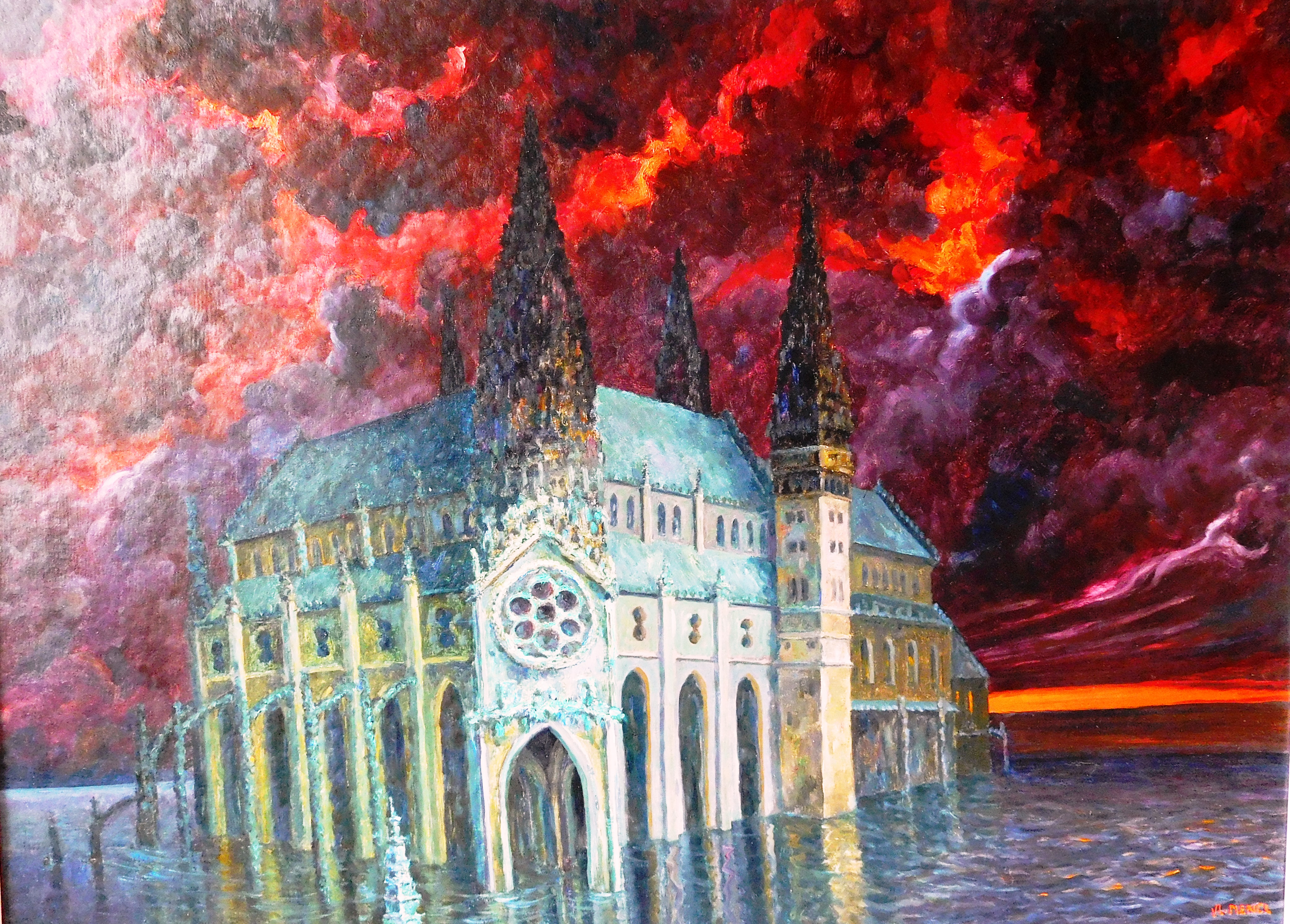 Vladimír Mencl dílo 11